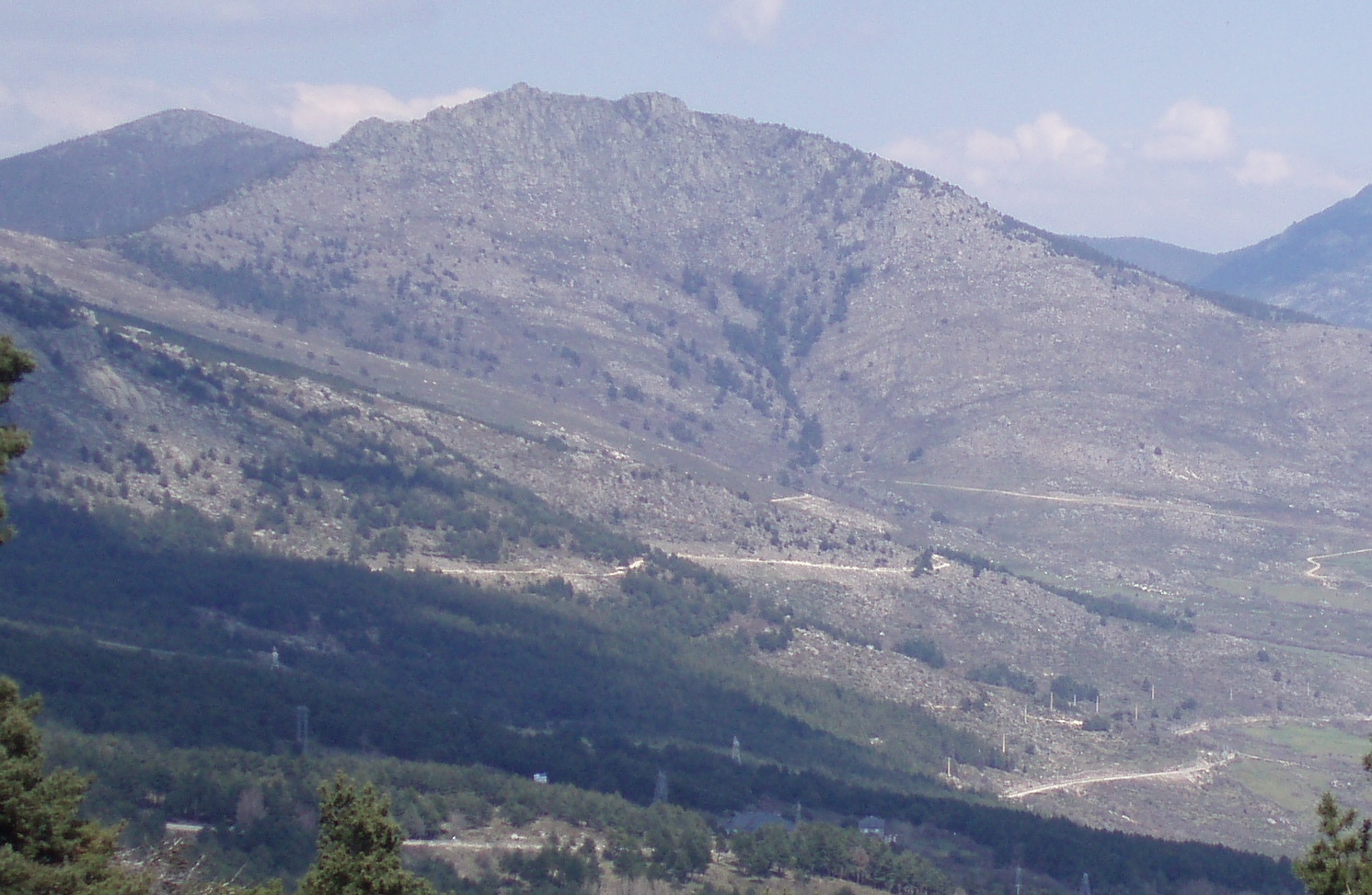 Vertiente sur de La Peñota (1.945 m), pico de la Sierra de Guadarrama (centro de España).